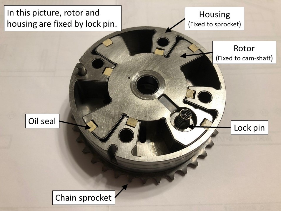 トヨタ2ZR-FXE型エンジンのVVT内部構造(ロック時)